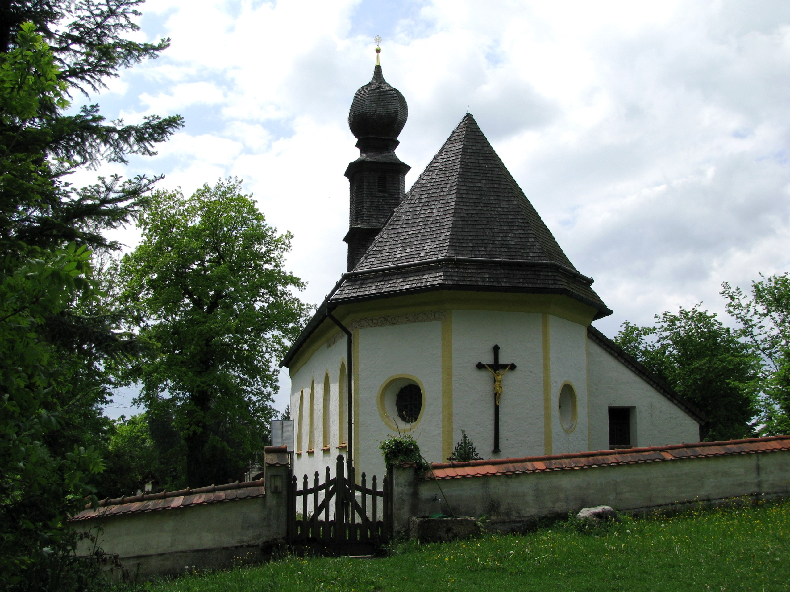 Rampertshofen, Gemeinde Dietramszell; kath. Filialkirche St. Georg; spätgotisch, von 1530; alte Friedhofsmauer; Ansicht von Osten.